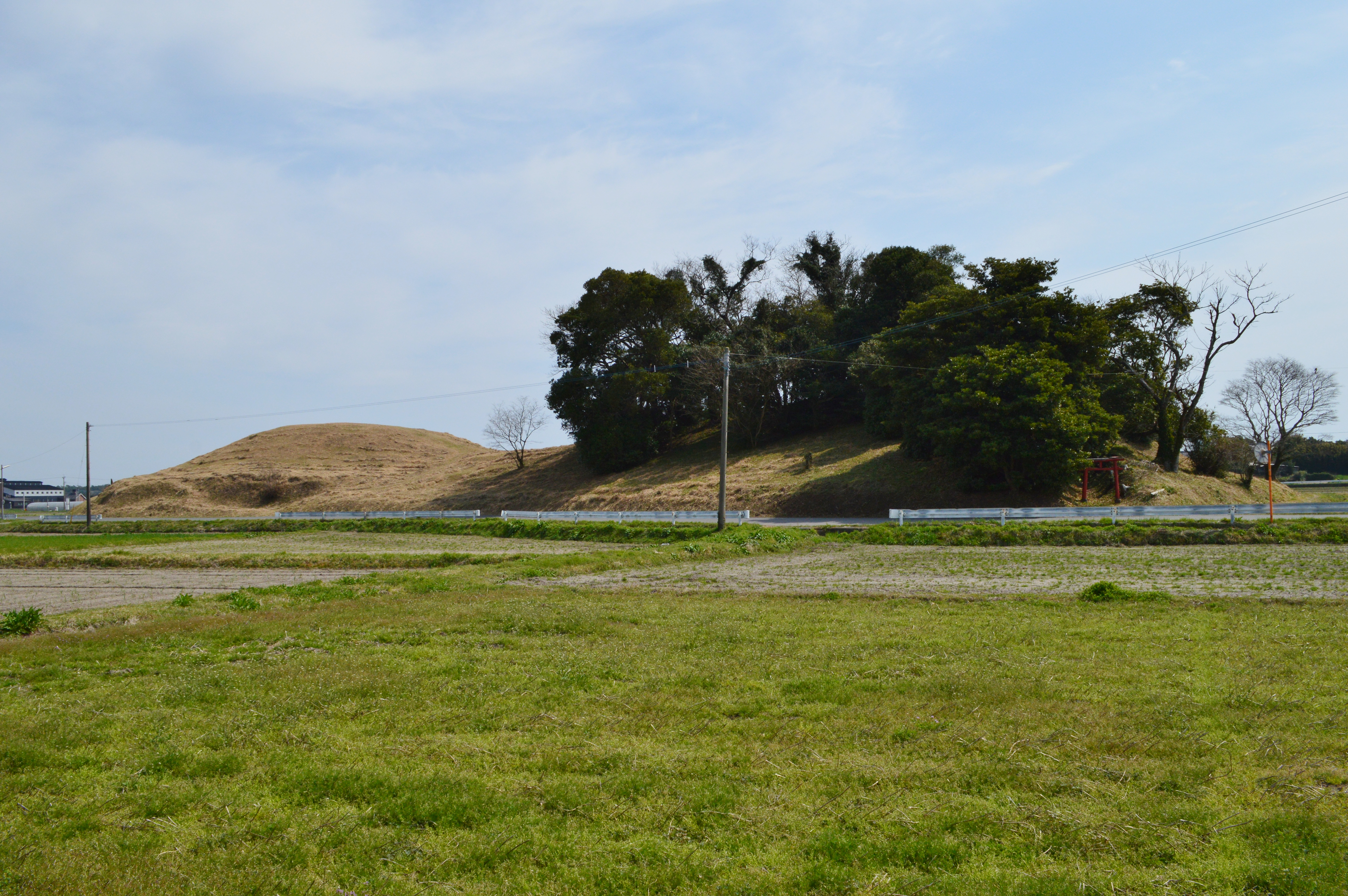 横瀬古墳 墳丘全景